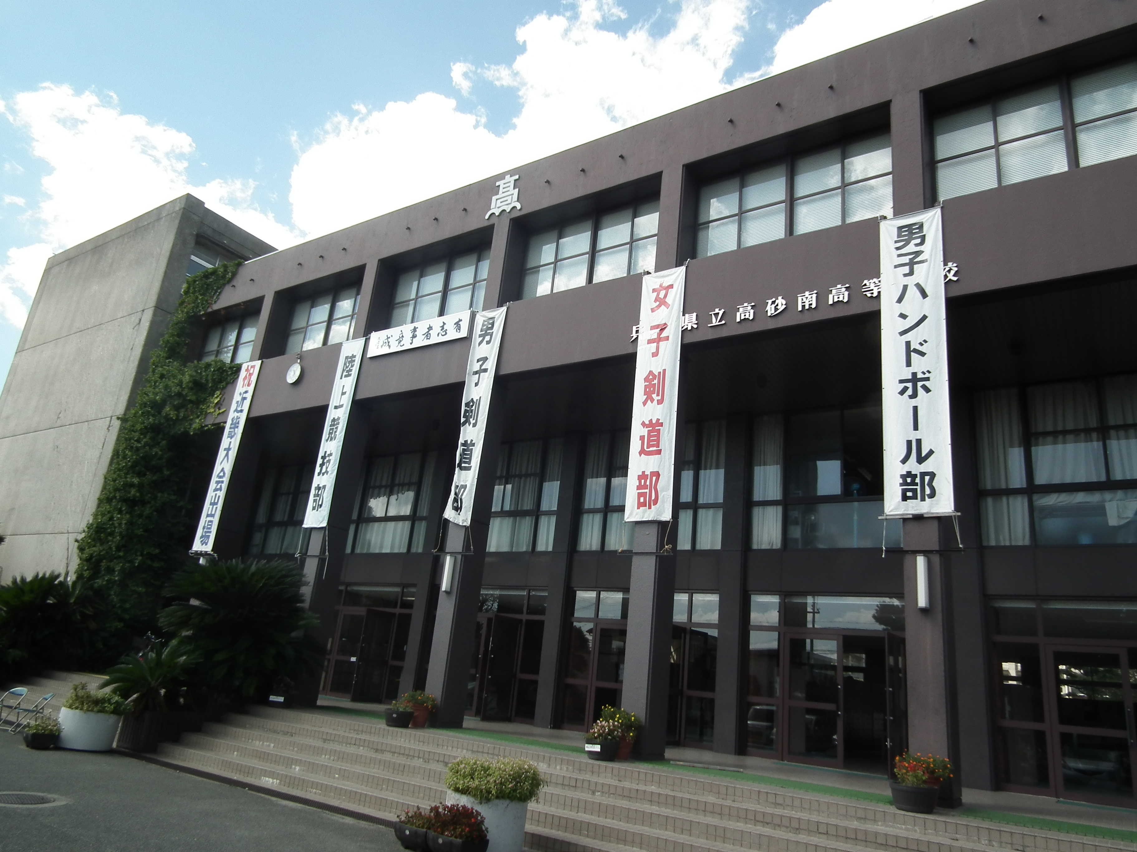 高砂南高校昇降口